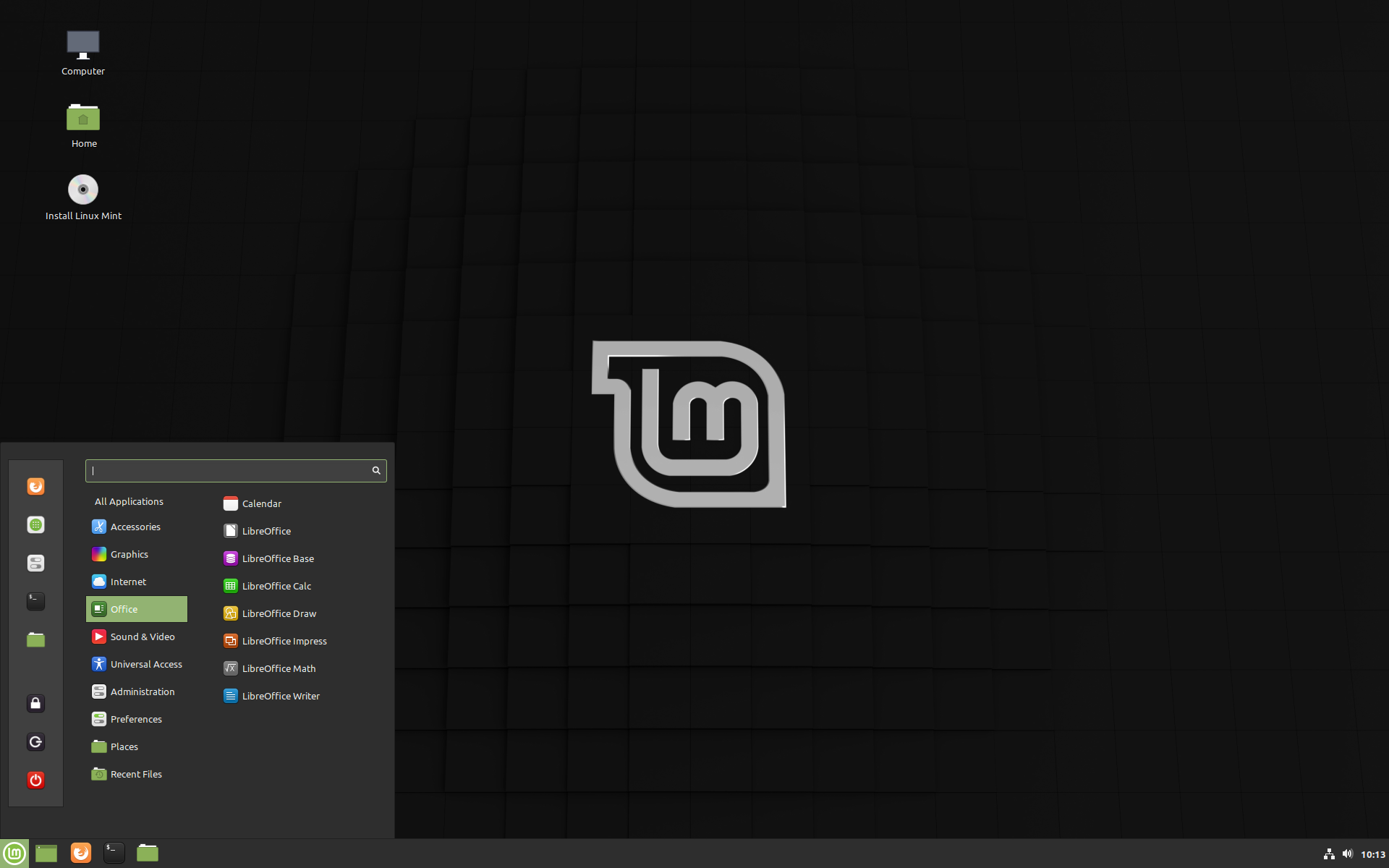 Linux Mint 19 Tricia Cinnamon